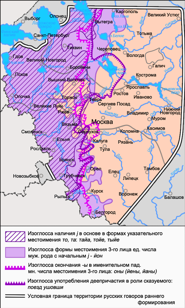 Карта западной диалектной зоны русского языка. Источники: Захарова К. Ф., Орлова В. Г. Диалектное членение русского языка — 2-е изд. — М.: Едиториал УРСС, 2004. — ISBN 5-354-00917-0, с. 84. Язык русской деревни. Диалектологический атлас. — Наречия и диалектные зоны. Бромлей С. В., Булатова Л. Н., Захарова К. Ф. и др. Русская диалектология / Под ред. Л. Л. Касаткина — 2-е изд., перераб. — М.: Просвещение, 1989. — ISBN 5-09-000870-1, с. 205—206